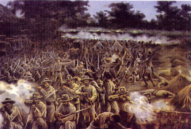 dessin anonyme sur le combat Marracuene